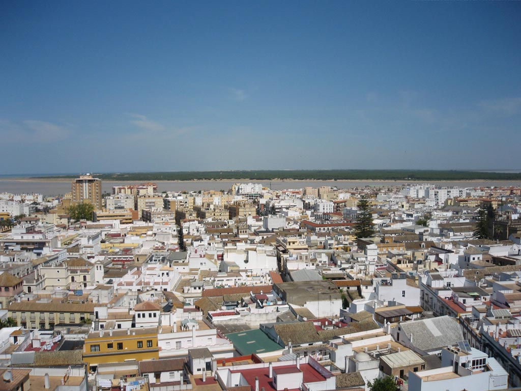 Vista parcial del Barrio Bajo de Sanlúcar de Barrameda, con el río Guadalquivir y Doñana al fondo. Fotografía hecha desde la torre del homenaje del Castillo de Santiago.